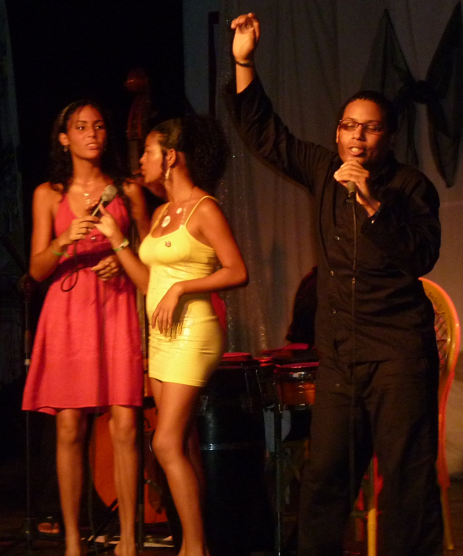 Kantistoj de la grupo "Amindaj" dum koncerto okazinta la 27-an de julio 2010 kadre de la 66-a Internacia Junulara Kongreso de TEJO en Villa Trópico, Santa Cruz del Norte, Kubo.